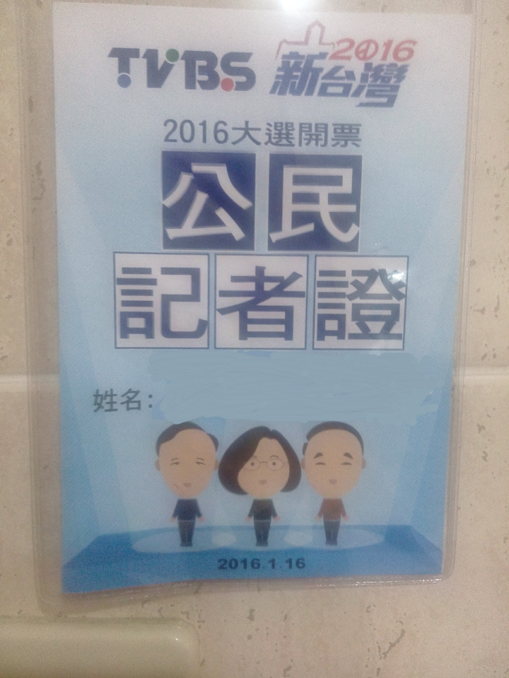 無線衛星電視台(TVBS)於2016年中華民國總統選舉期間發送公民記者證給報名民眾。